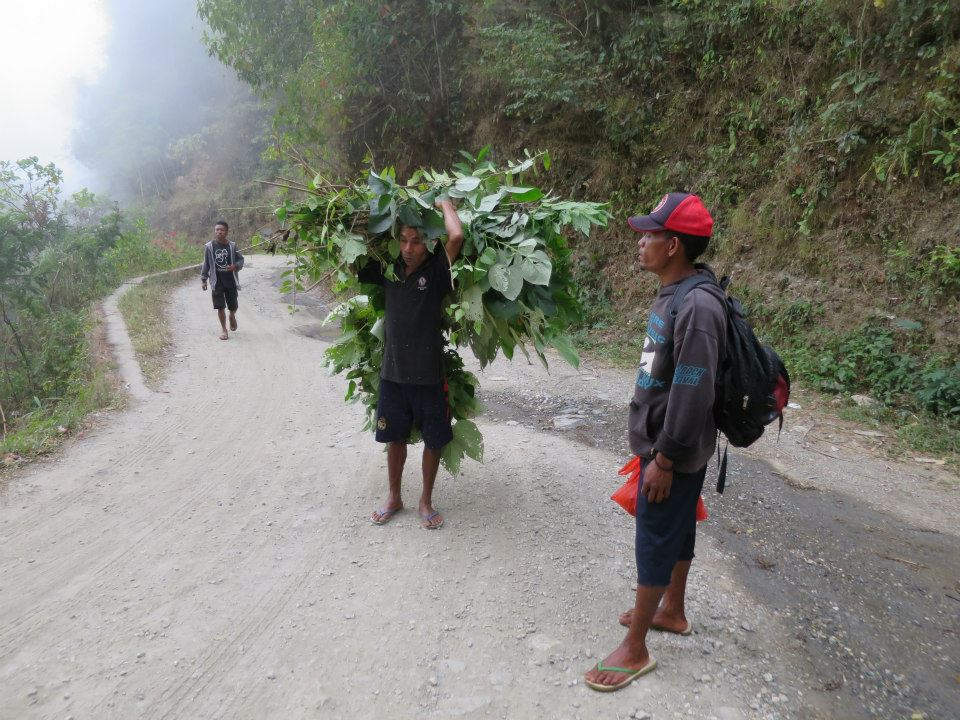 Remexio Vila